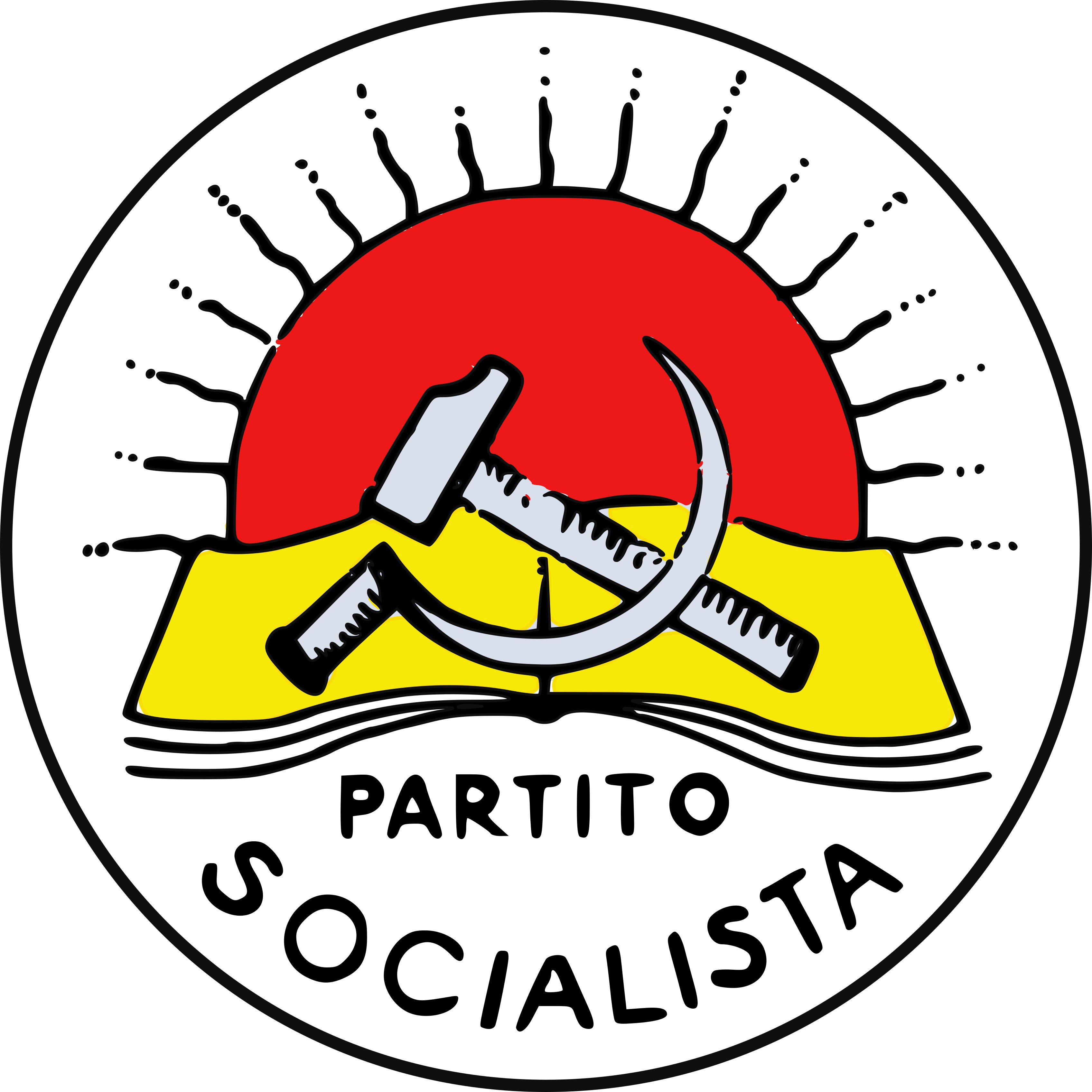 Símbolo do Partito Socialista Italiano por volta de 1919